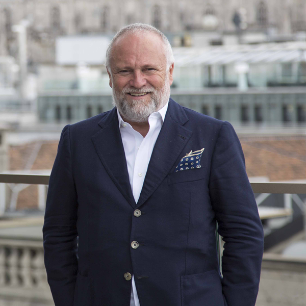 Antonello Colonna - 2015